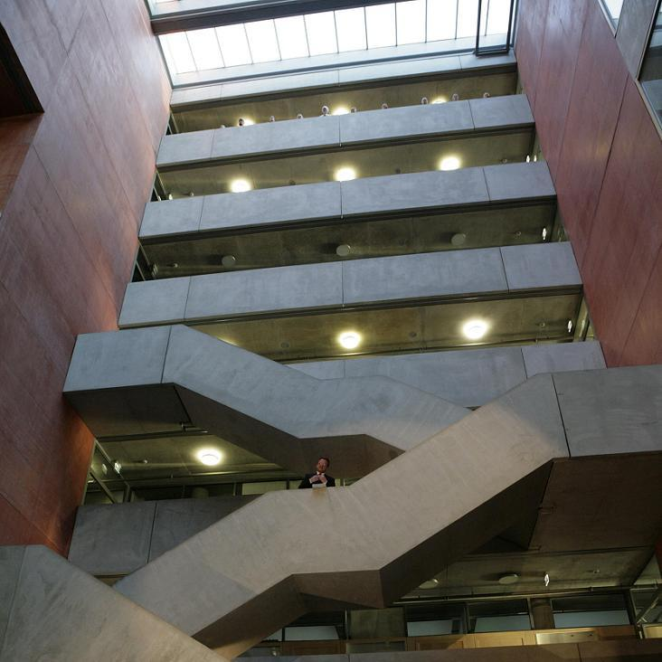 (vorübergehende Spielstätte) Theater in der FH Frankfurt, 2008; teAtrum VII (sprich: Theatrum 7) ist ein freies Theater in Frankfurt am Main und Berlin. Die wichtigste Frankfurter Spielstätte befindet sich in einer alten, denkmalgeschützten Fabrikhalle im Stadtteil Ostend sog. Naxos-Halle (Adresse: Wittelsbacherallee 29). Daneben finden die Produktionen aber auch an anderen (für Theater teilweise ungewöhnlichen) Orten statt: So beispielsweise in einem alten Kellergewölbe, in und auf dem Campus der Fachhochschule, im Foyer der Oper, in Schulen, Clubs, Diskotheken usw.